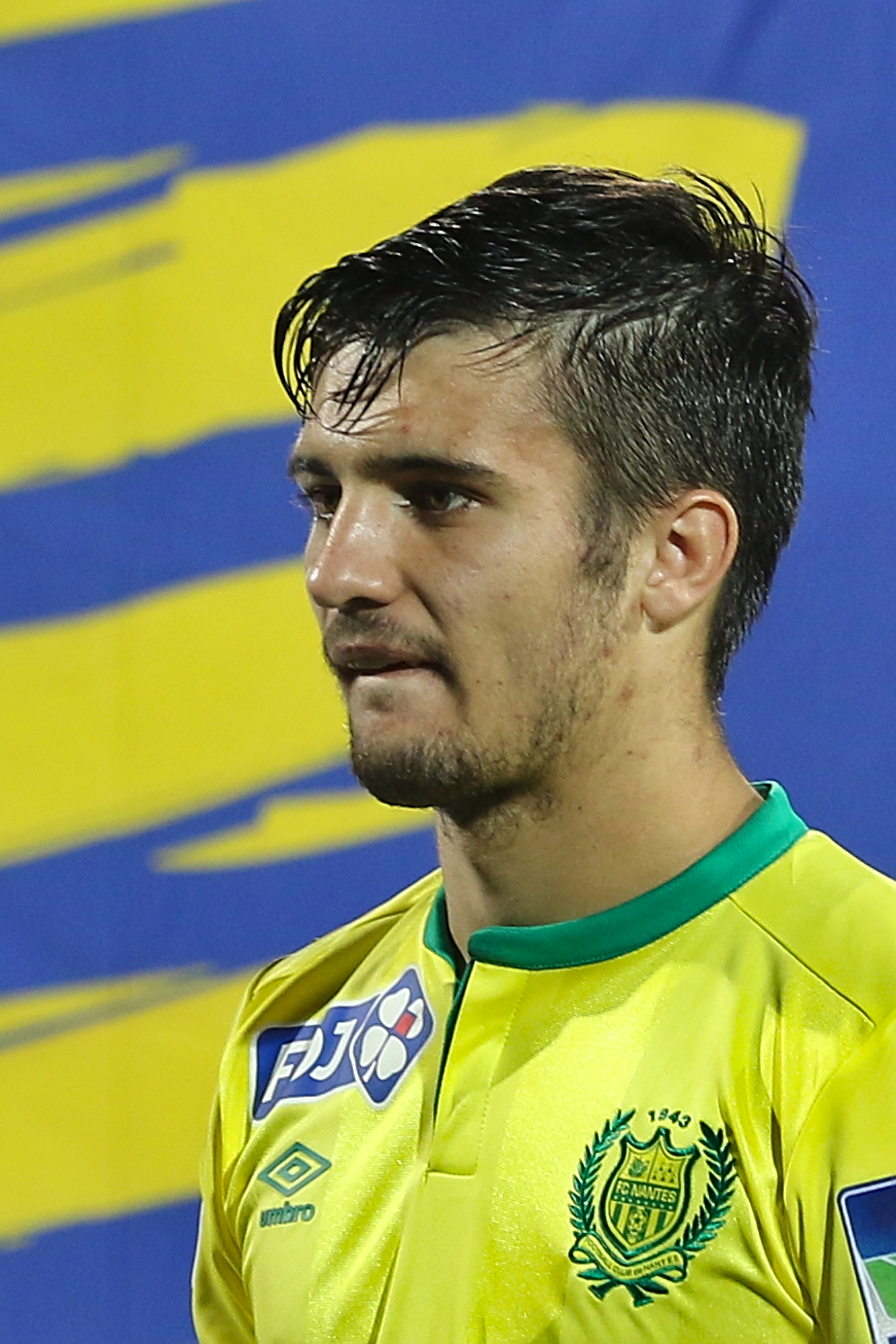 FBBP01 - FCN - 20151028 - Coupe de la Ligue - Léo Dubois